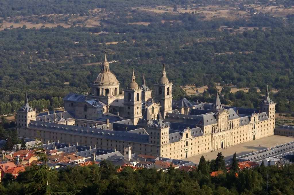 Monasterio de San Lorenzo de El Escorial